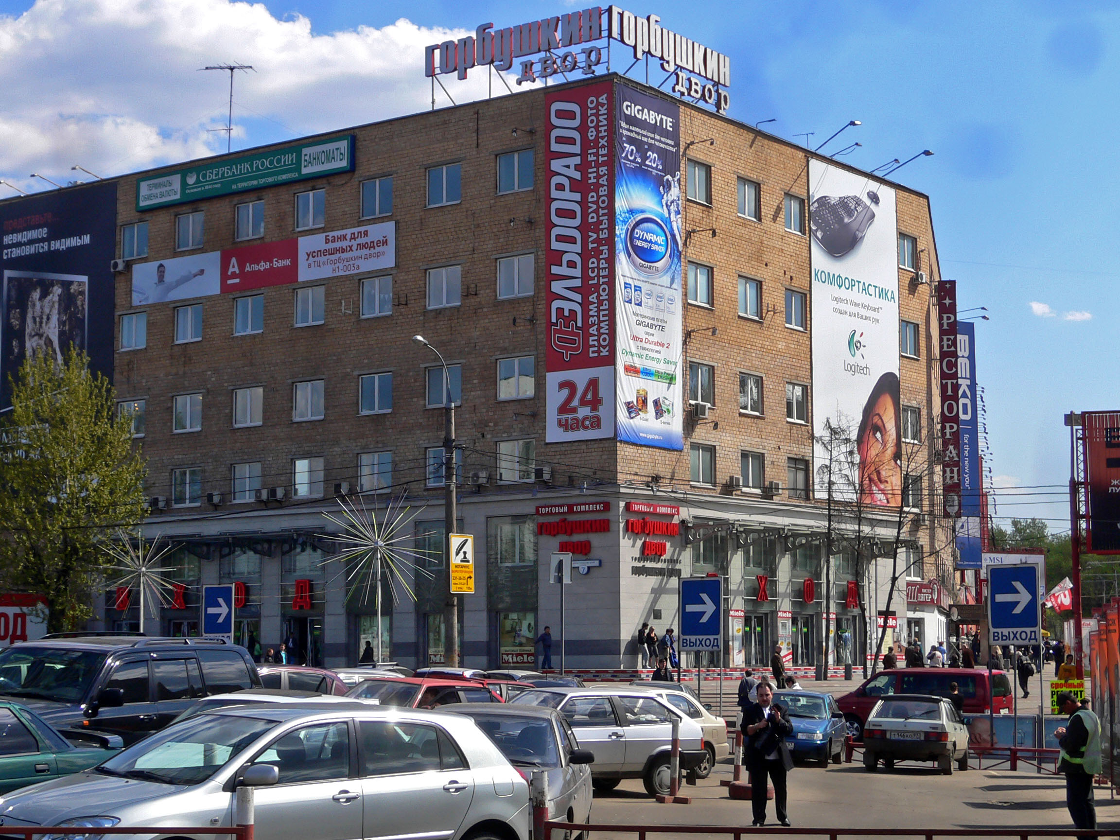 Gorbushka